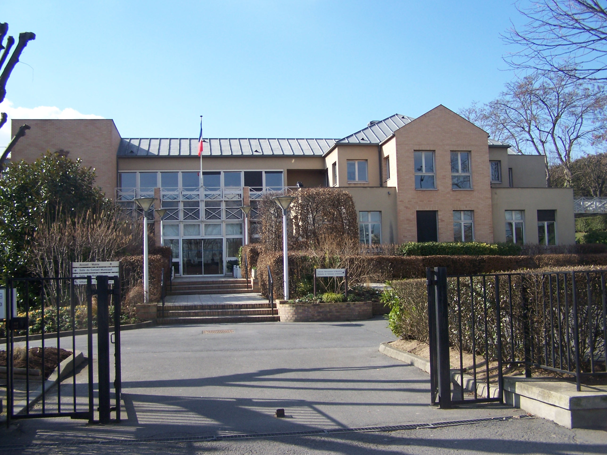 Mairie du Pecq, Yvelines, France